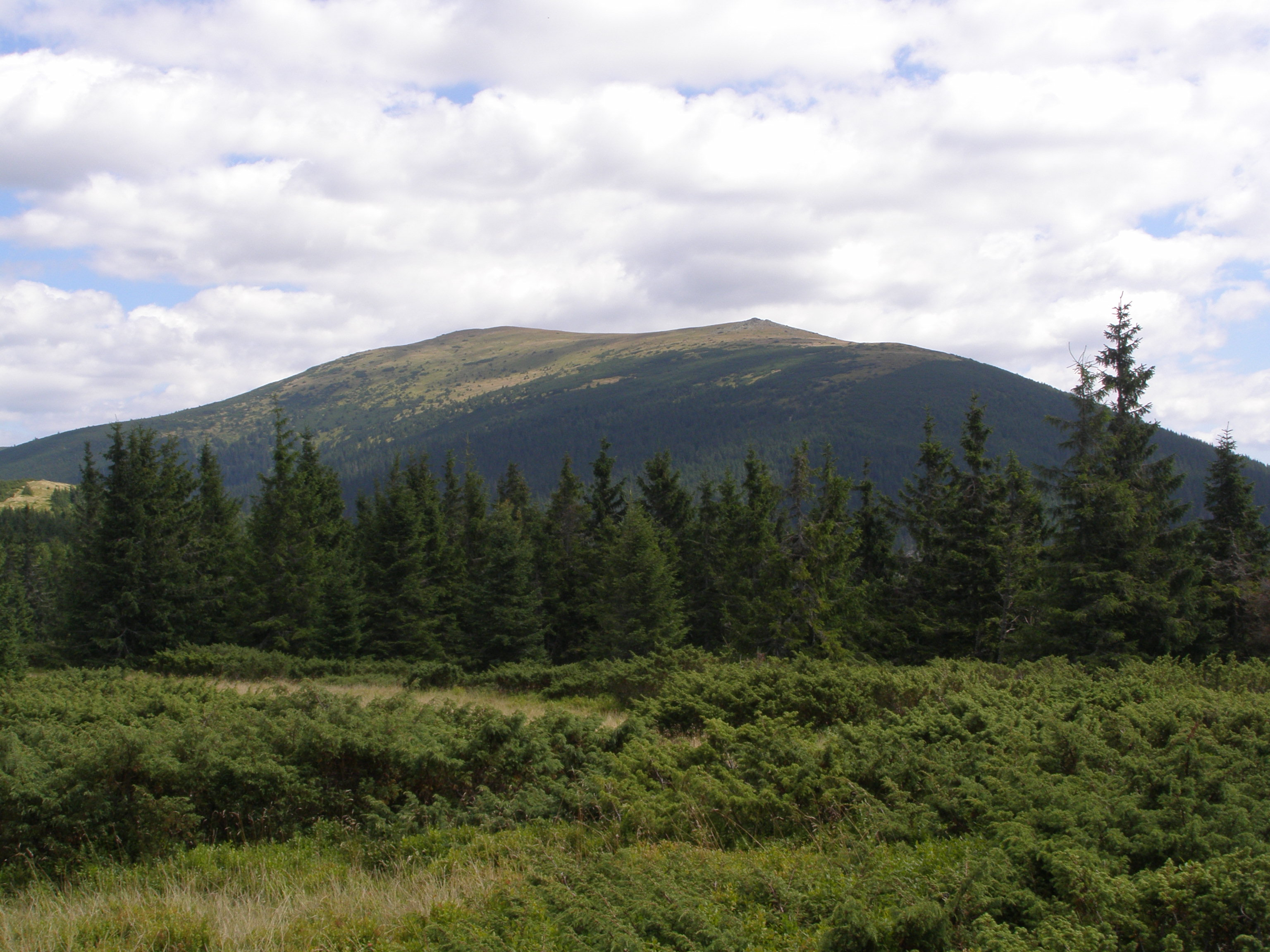 Nízké Tatry, Kráľovohoľské Tatry, pohled z východního úbočí vrcholu Andrejcová (1520 m) na jihovýchod na vrchol Bartková (1790 m)